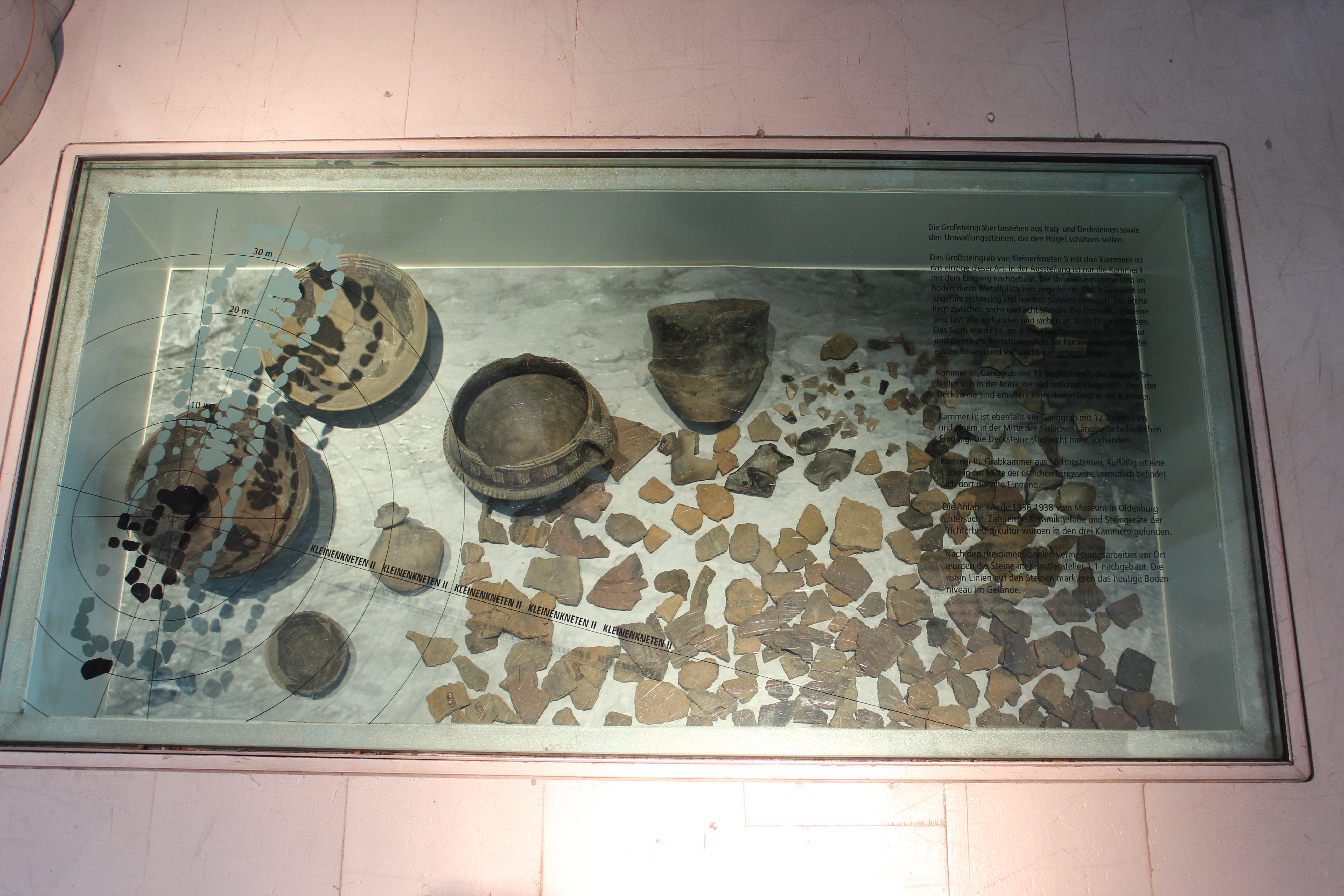 Fundbeispiele aus den Kleinenknetener Steinen, fotografiert im Landesmuseum für Natur und Mensch, Oldenburg